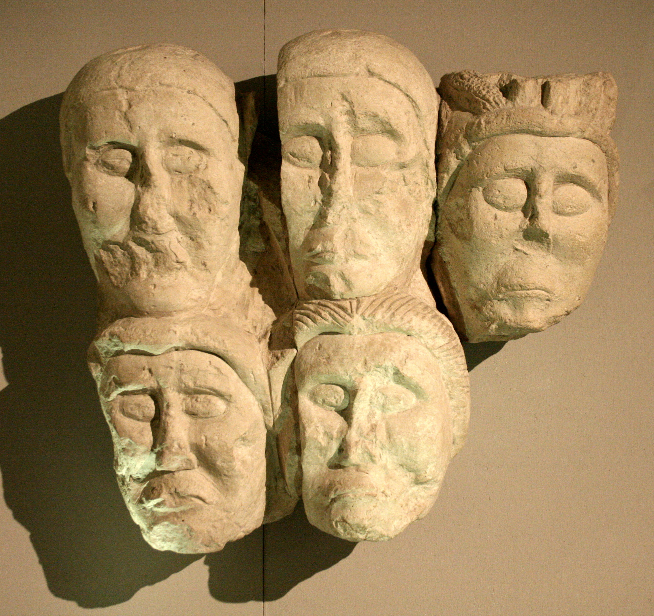 Têtes coupées provenant du site de l'oppidum d'Entremont, département des Bouches-du-Rhône (France), conservées au Musée Granet à Aix-en-Provence